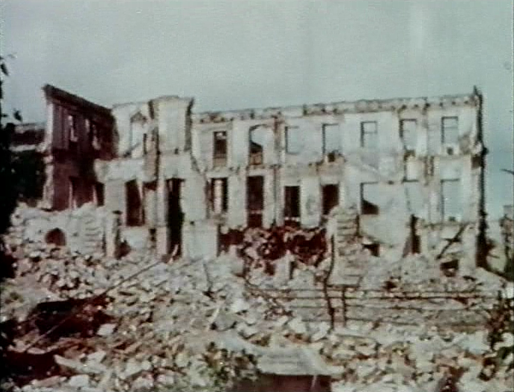 Ruine des Braunen Hauses in München